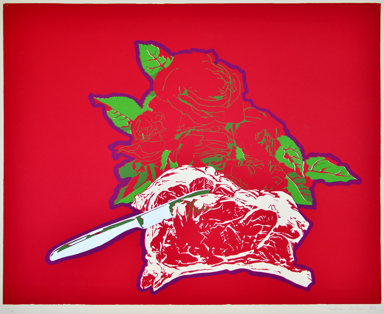 Naděžda Plíšková, Bez názvu, bar. litografie, 42x51,5 cm, 1971